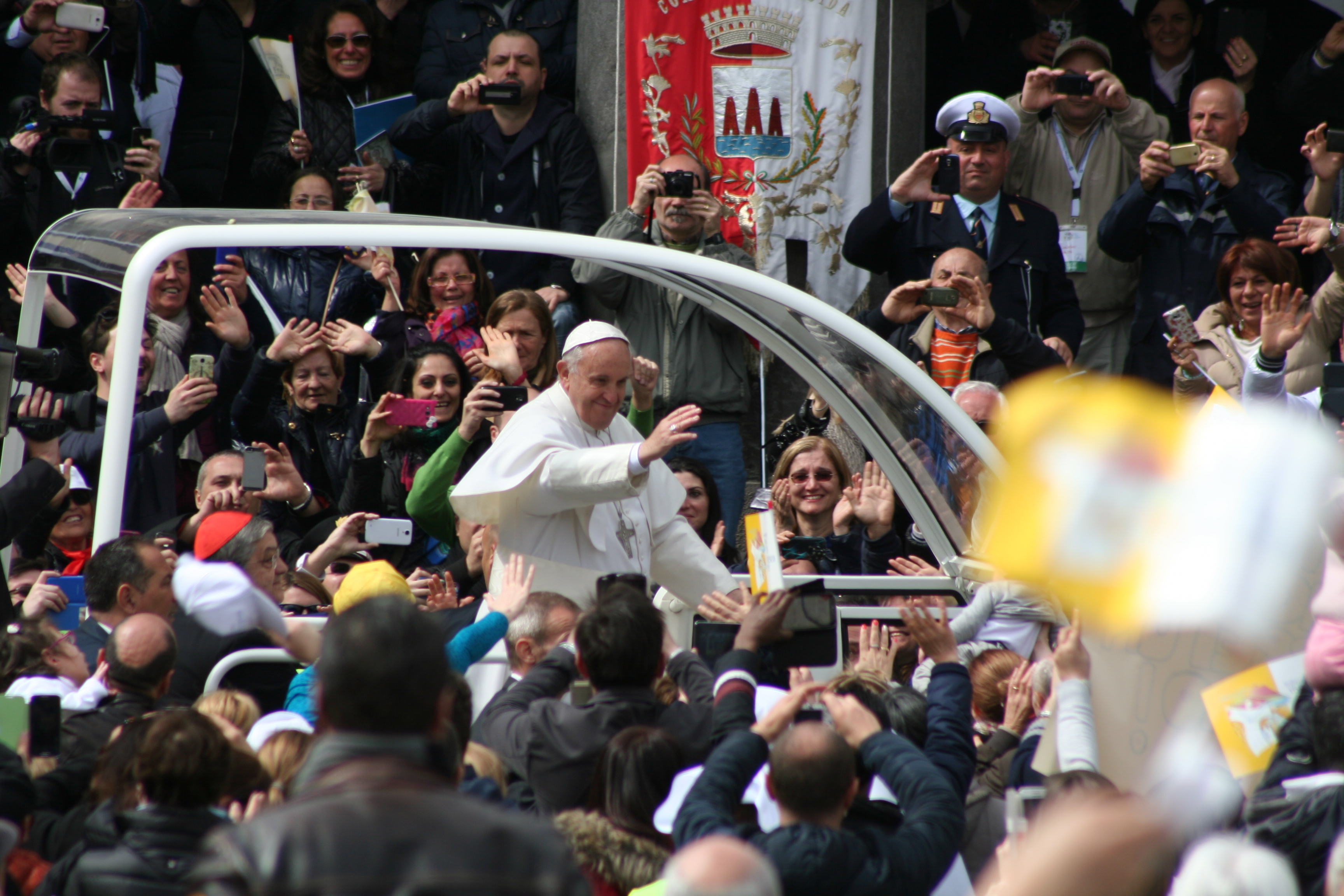 Visite du pape François à Naples le 21 mars 2015